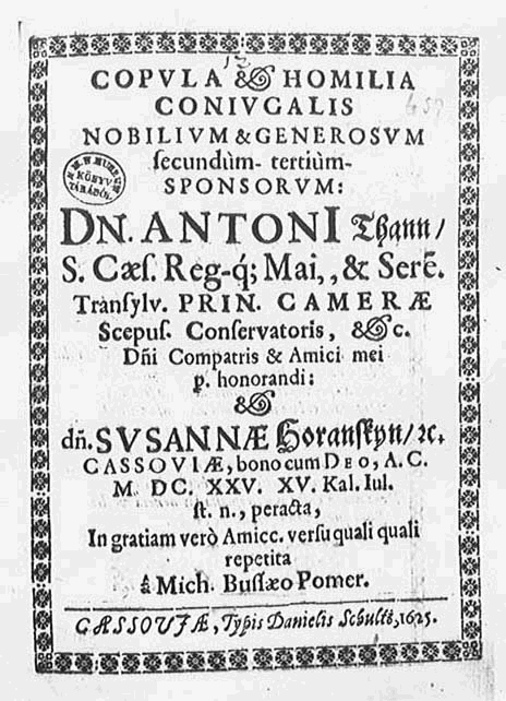 Bussaeus Mihály Copvla et homilia conivgalis nobilivm et generosvm… kezdetű 1625-ben kiadott munkájának címlapja.